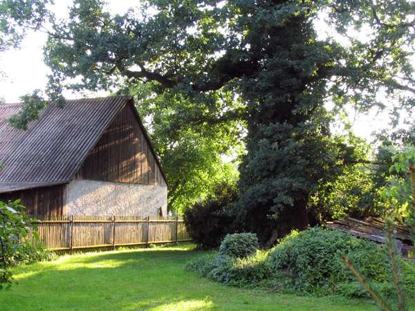 Kmen dubu s břečťanem na zahradě v Kařízku.